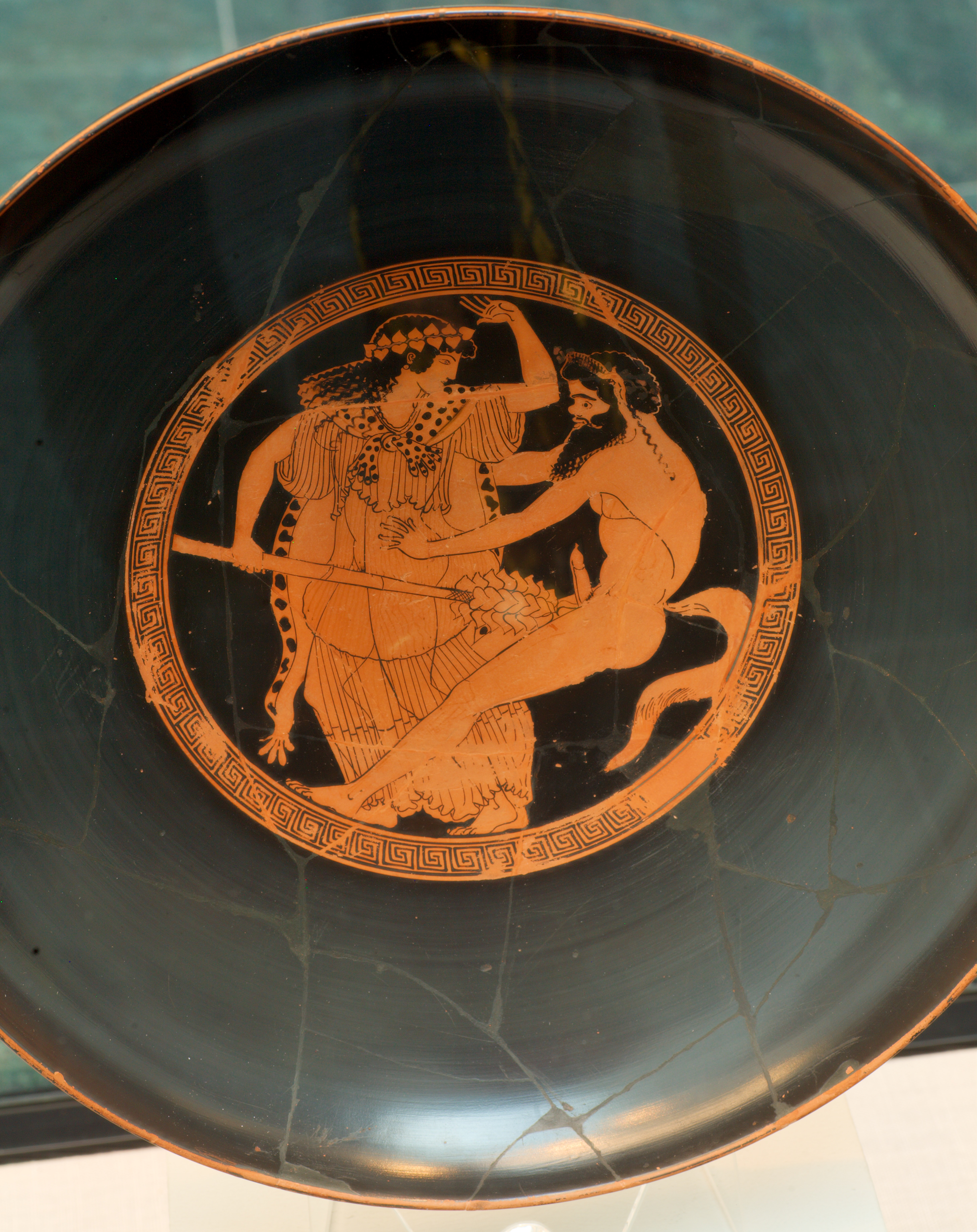 Maenade and Satyr. Pottery by Makron. Staatliche Antikensammlungen München Kat. 94